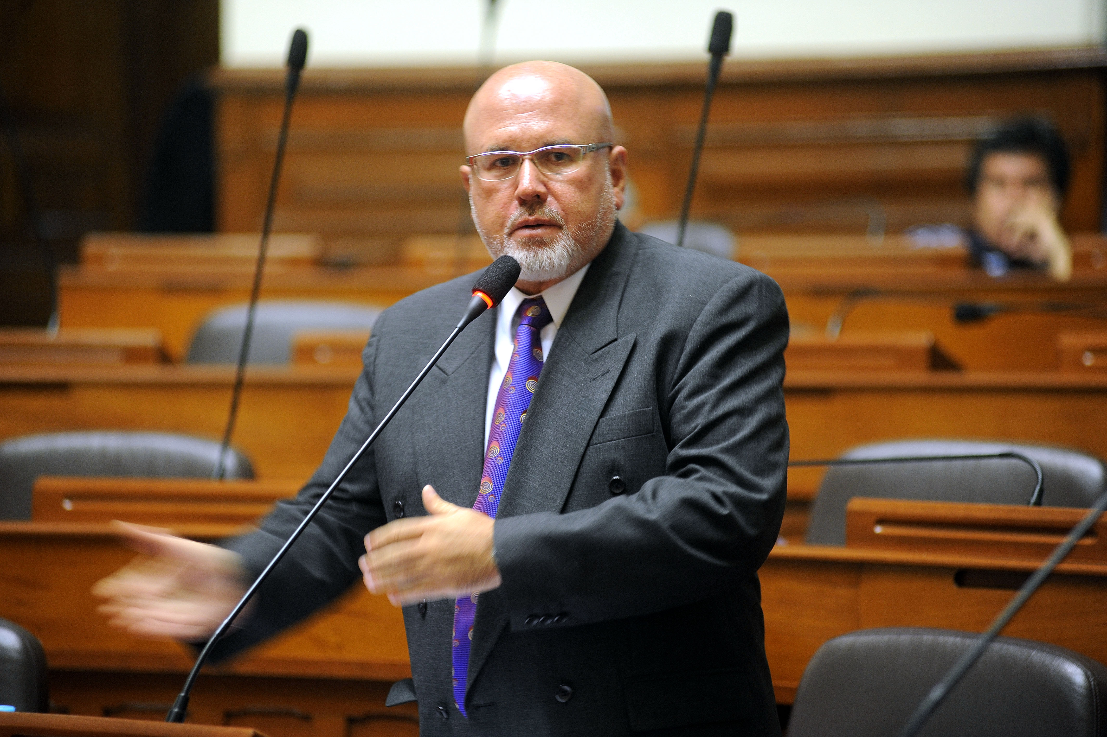 El Parlamentario Carlos Bruce Montes de Oca, durante la sesión matutina efectuada por el Pleno, en el cual fijó su posición respecto a uno de los temas en debate.